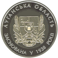 75 років Луганській області реверс